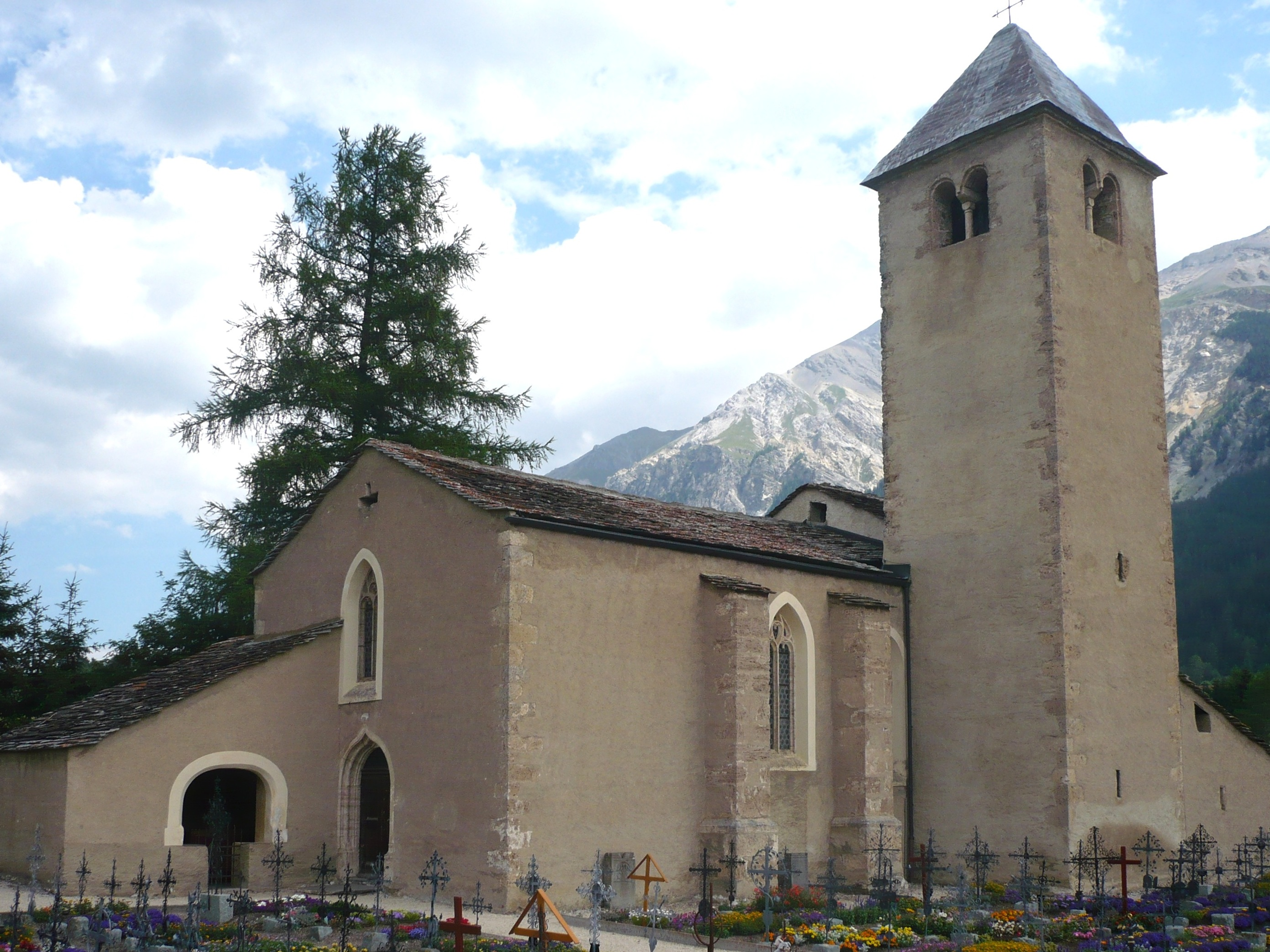 Kirche St. Maria Lantsch/Lenz von Südwesten